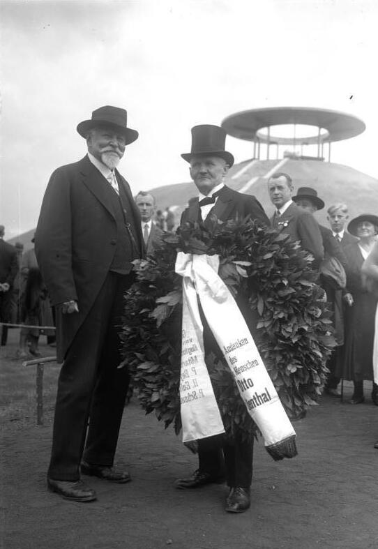 Die Feierliche Enthüllung des neuen Lilienthal-Denkmals auf dem historischen Uebungshügel Otto Lilienthals in Berlin-Lichterfelde an seinem 36. Todestage ! Die einzigen überlebenden Mitarbeiter Otto Lilienthals, der Bruder Gustav Lilienthal (links) sowie der alte Monteur und Helfer Paul Baylich, am Fusse des Denkmals.